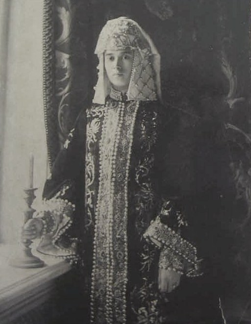 Графиня Ирина Васильевна Воронцова-Дашкова (1880—1917), дочь Василия Львовича Нарышкина. Первым браком за графом И. И. Воронцовым-Дашковымв. Развелась в 1913 году и вышла замуж за генерал-майора свиты Его Величества князя С. А. Долгорукого.